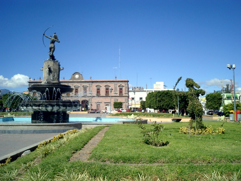 Zócalo de Ixmiquilpan, Hidalgo